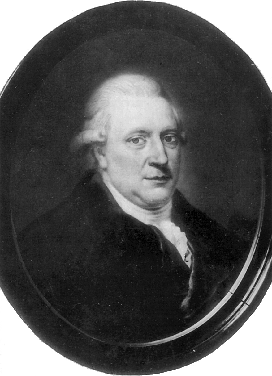 Porträt Johann von der Leyens (1734-1795)